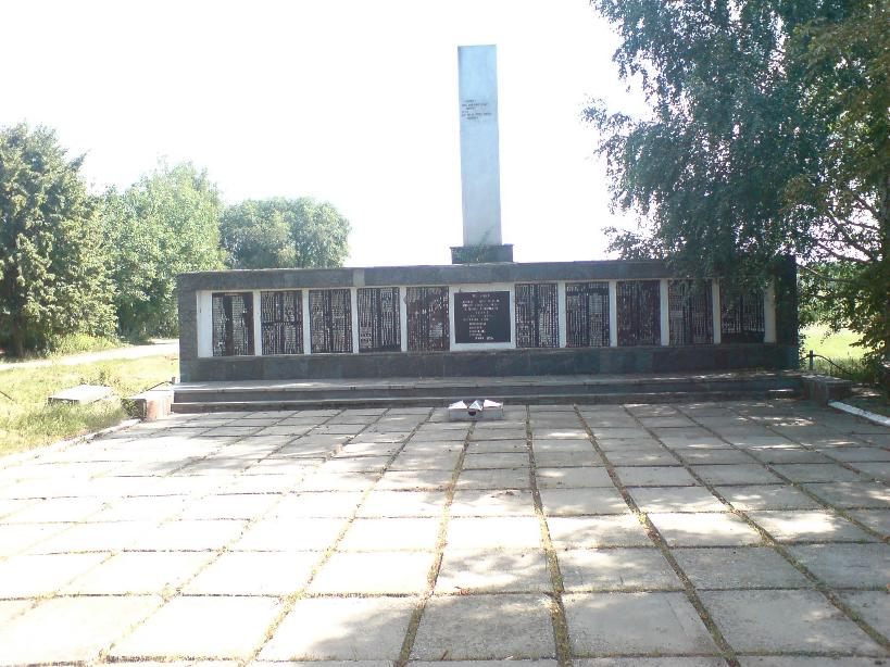 Меморіал загиблим воїнан